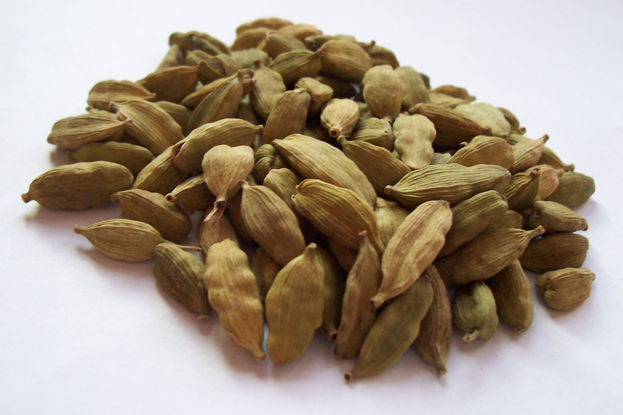 Kardamom geschlossen, Cardamom capsules